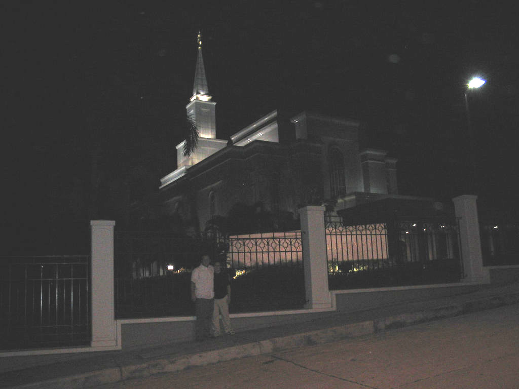 Guayaquil Temple